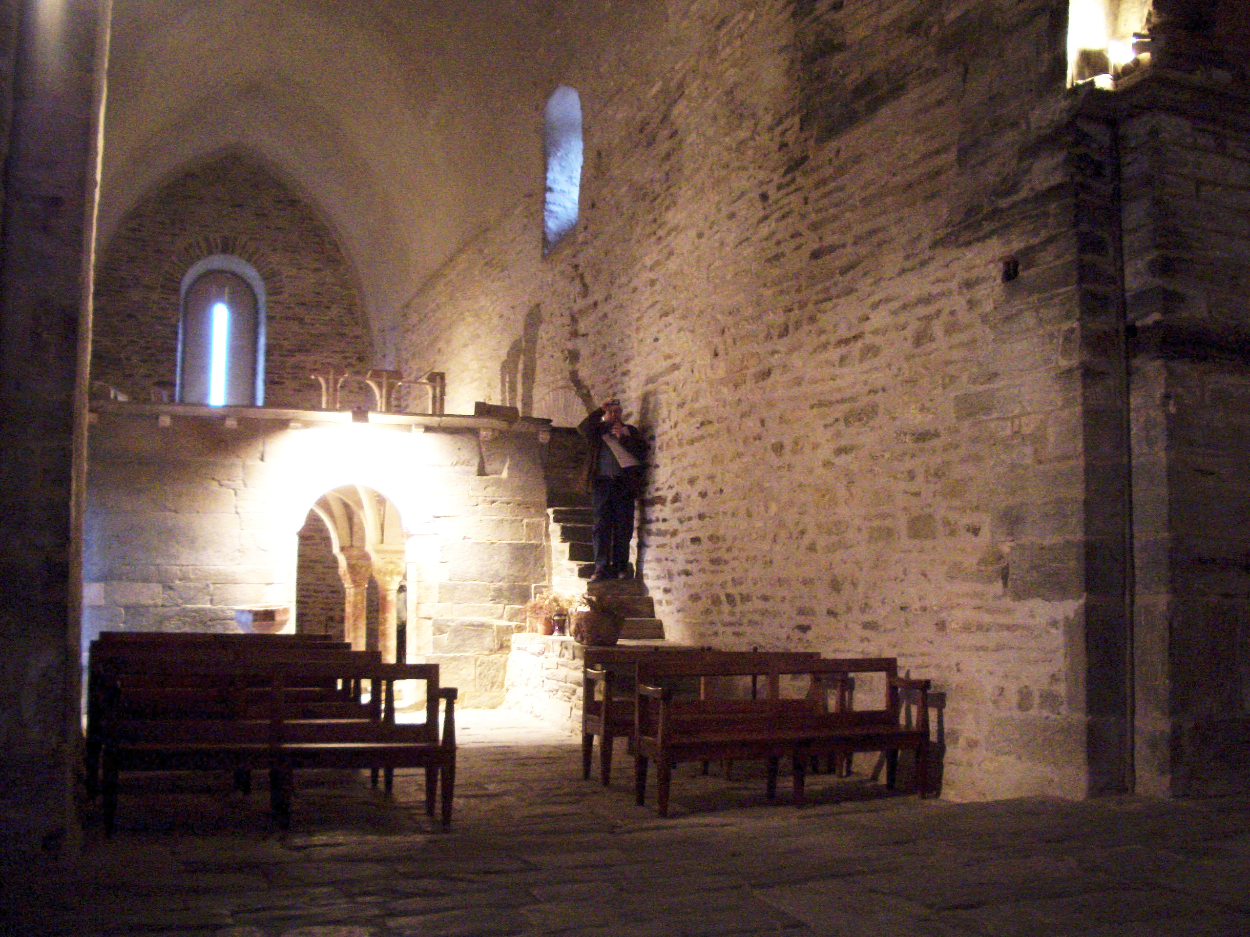 Veure títol